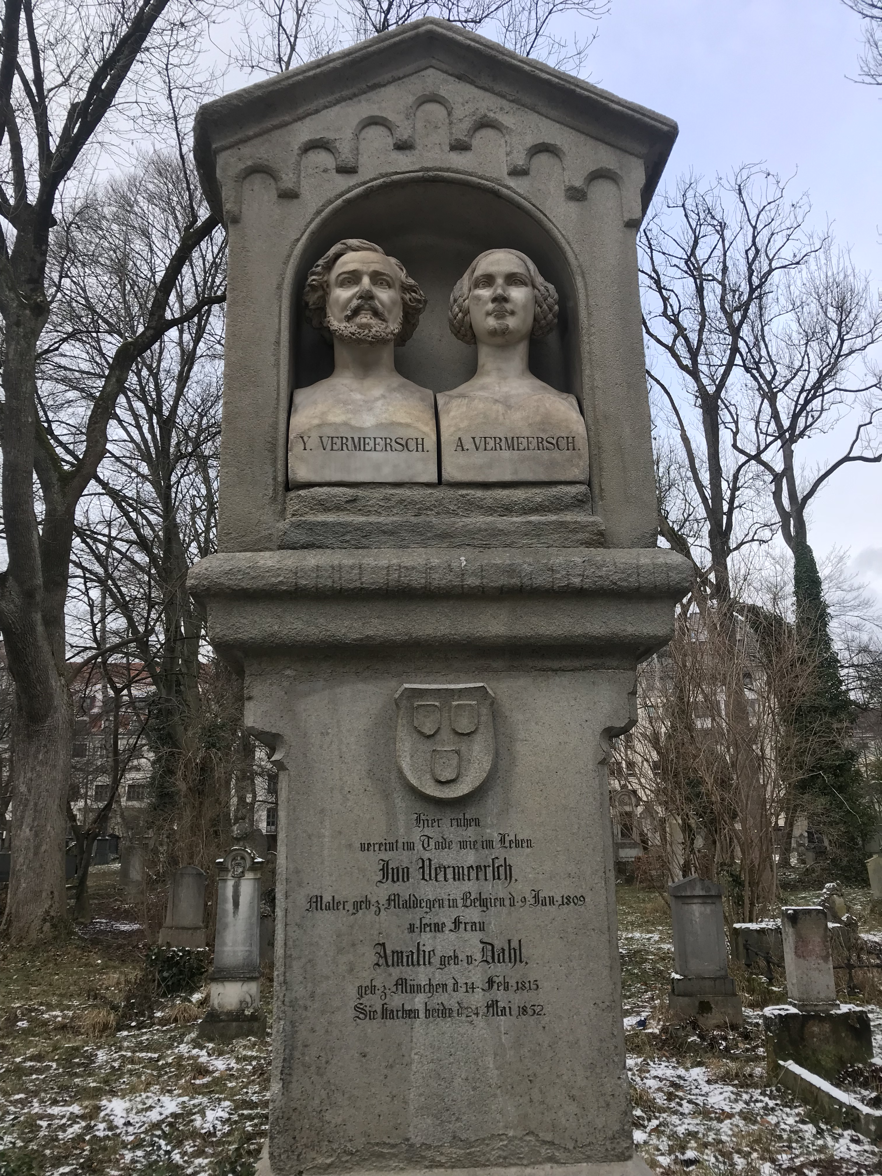 Grafmonument Ivo Vermeersch op het Südliche Friedhof in München